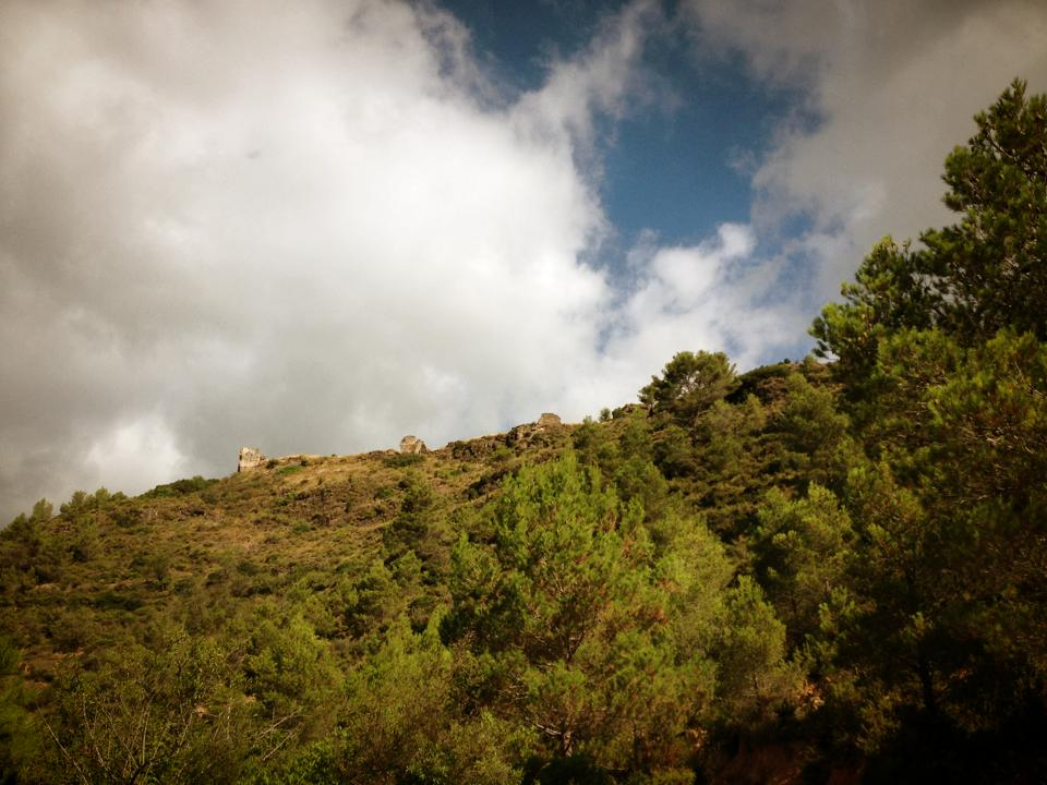 Vista del castell de Vilamalur